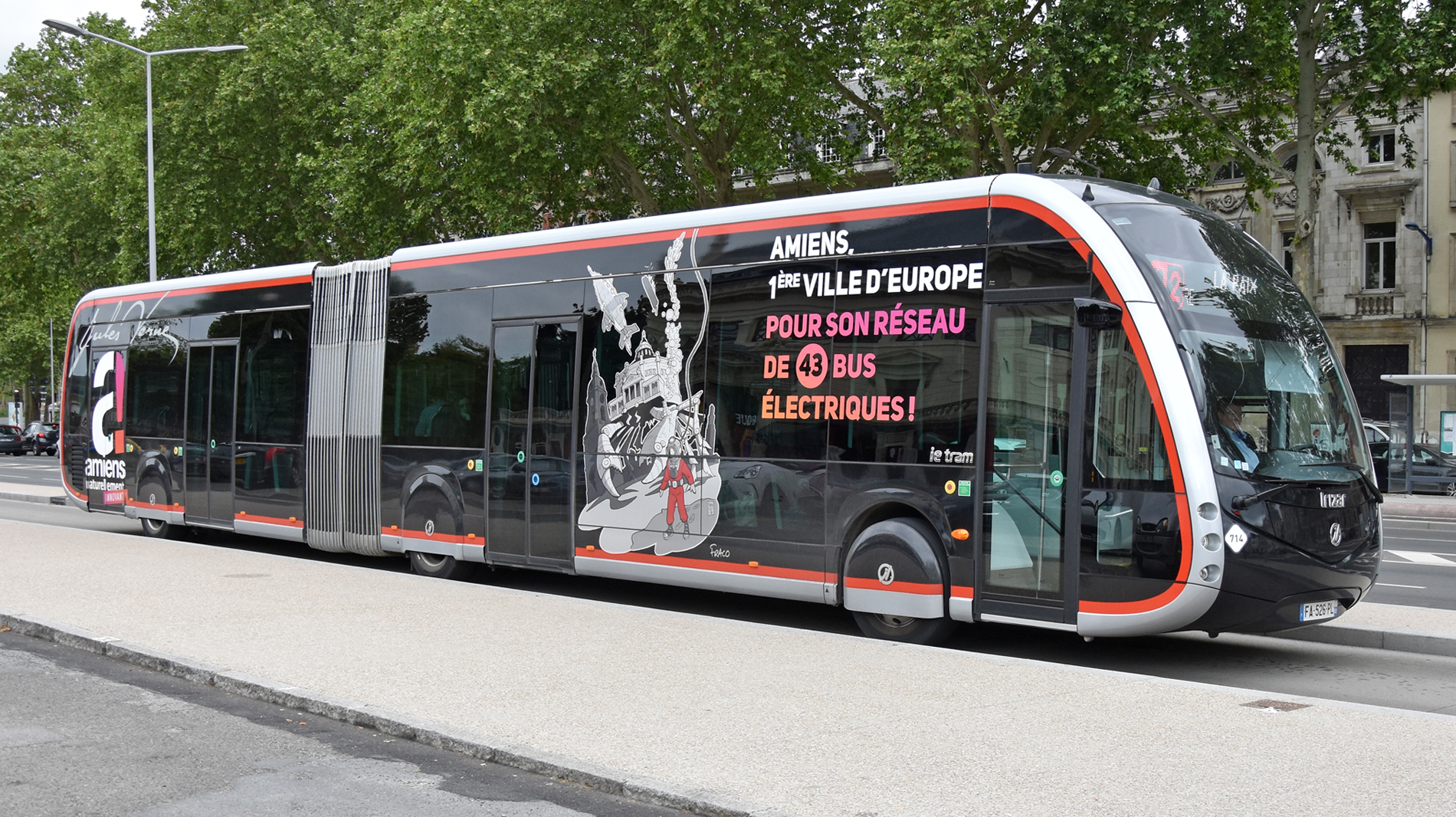 Bus n°714 avec une livrée spécifique